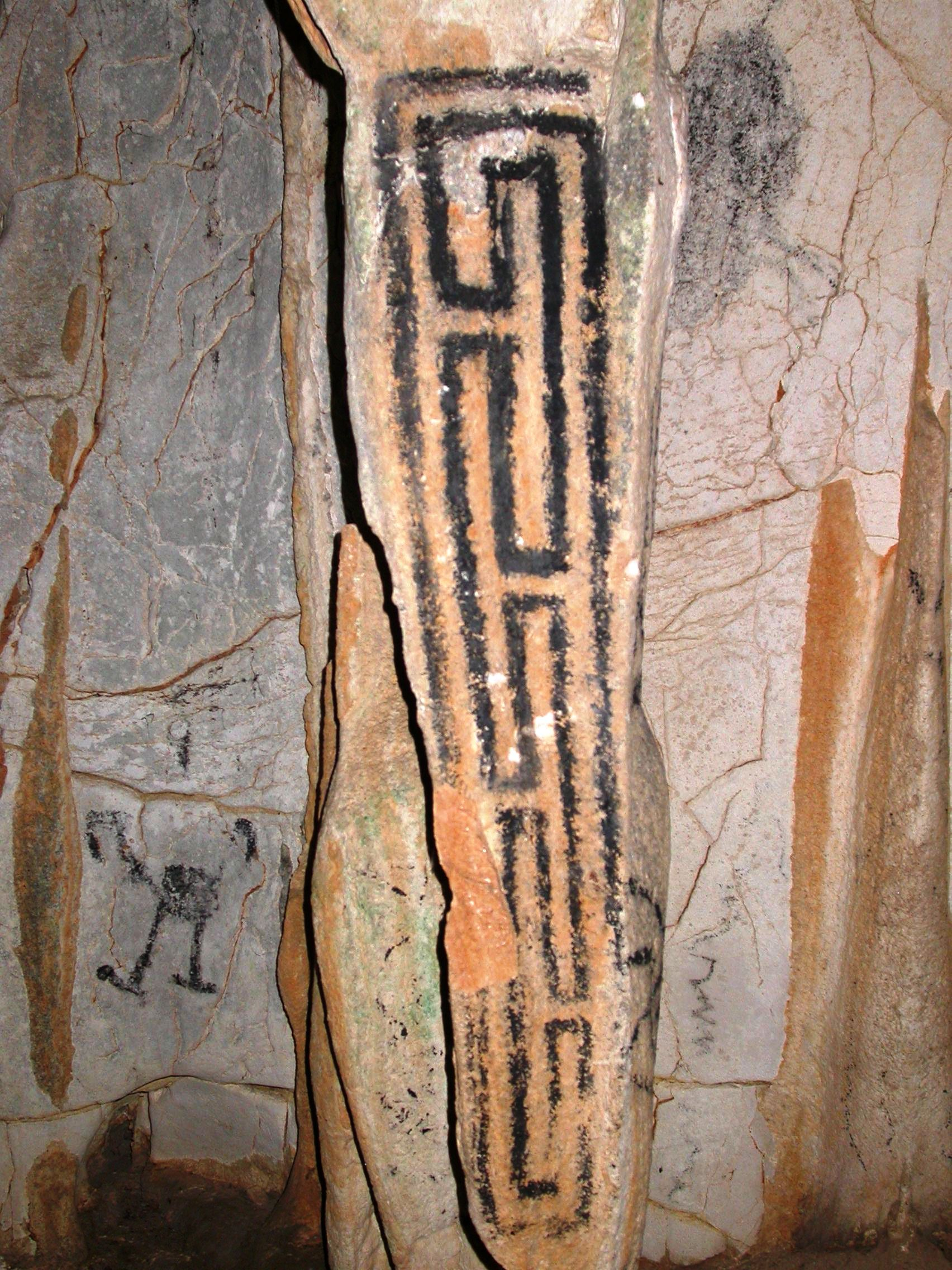 Pictografía laberíntica asociada a la cultura Igneri (Ciboney), Cueva del Puente, El Pomier.